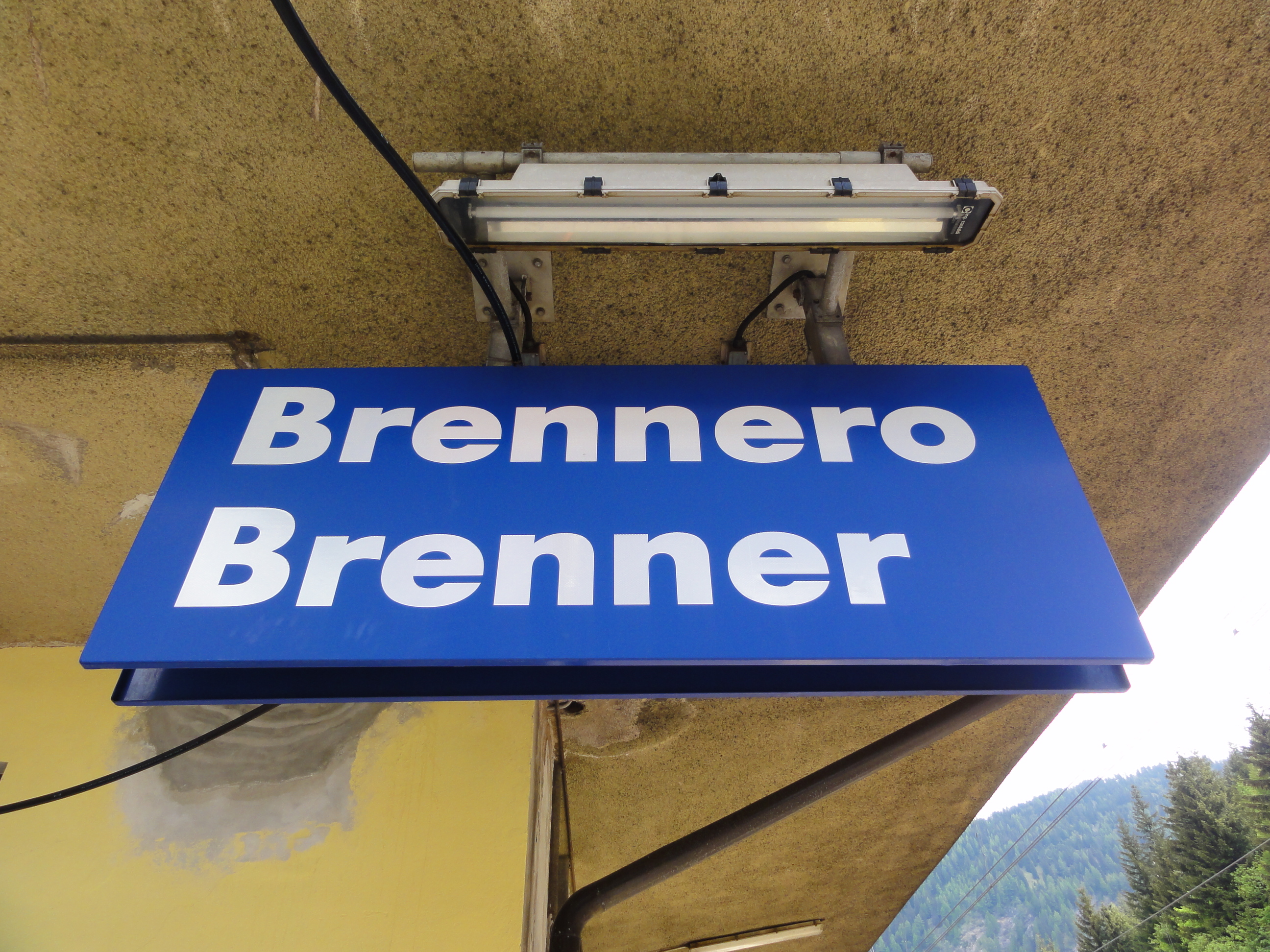 Bahnhofsschild "Brennero / Brenner"